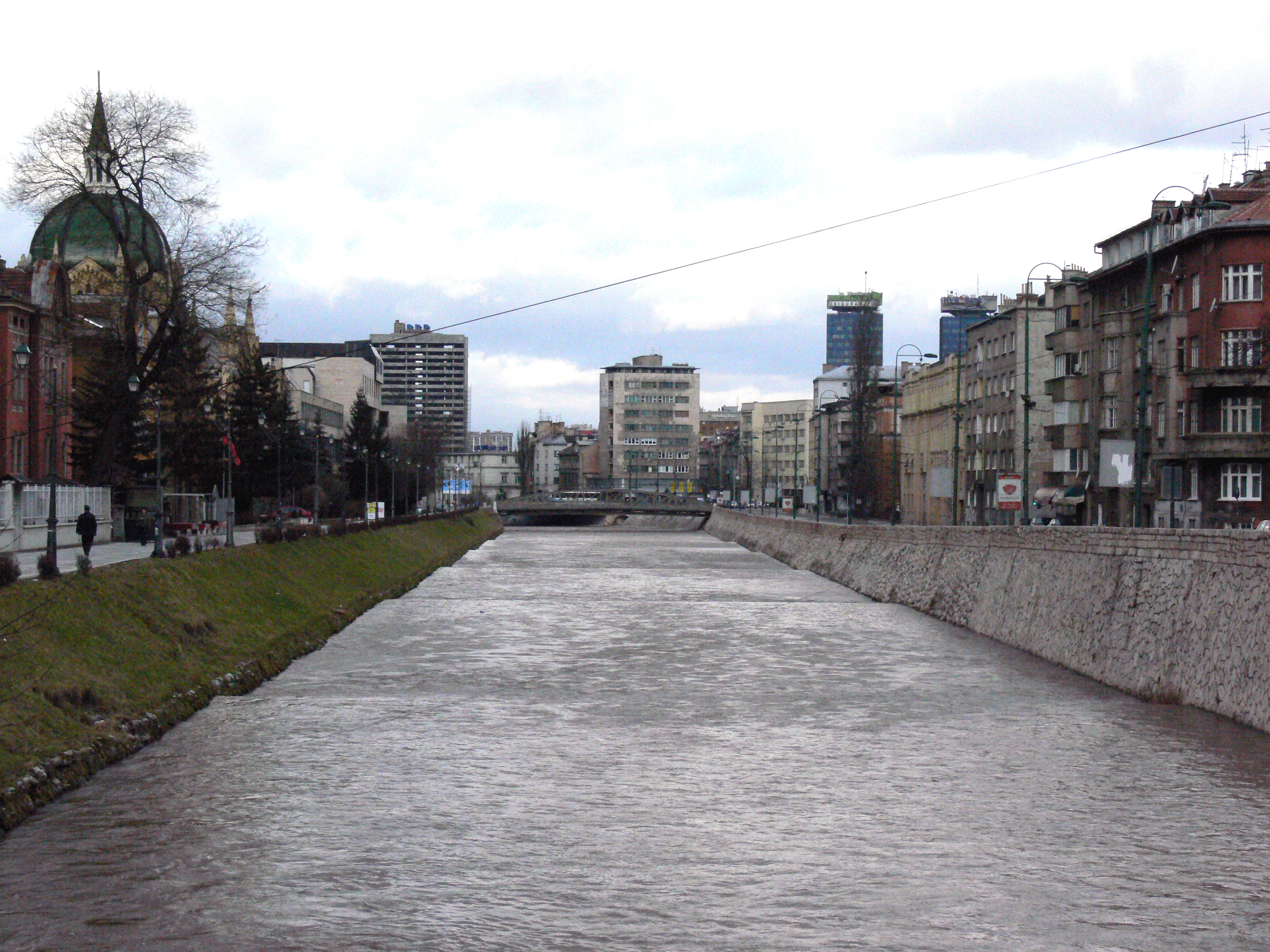 The river Miljacka in Sarajevo.